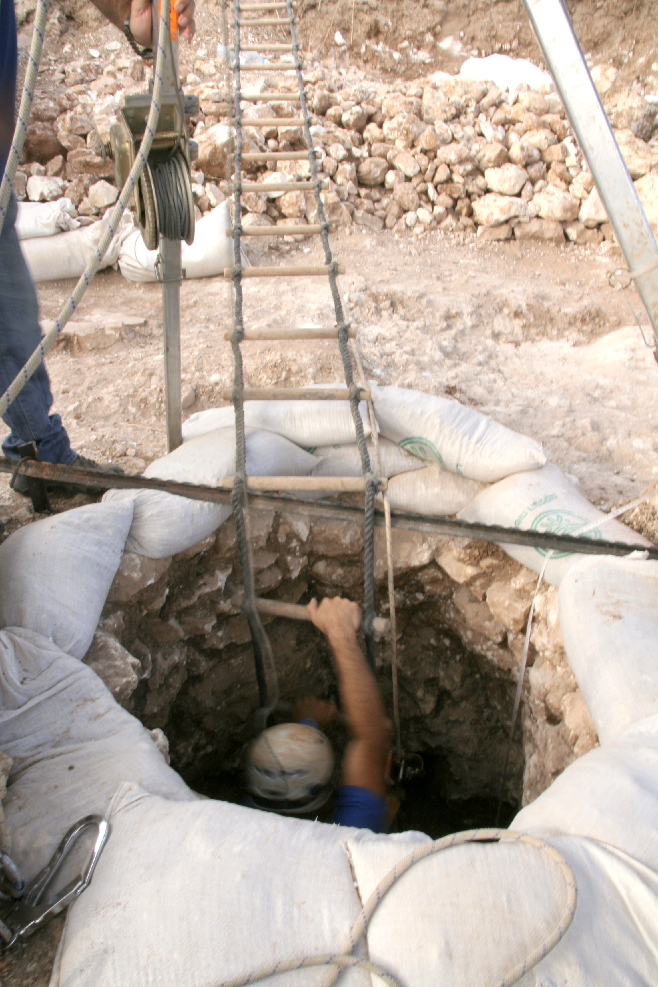 באר עינות ניסנית הוא שמה של באר עתיקה מהתקופה הנאוליתית הנמצאת ליד צומת כביש הגישה למושב היוגב. זוהי אחת הבארות הקדומות ביותר שנתגלו עד כה בארץ ישראל.